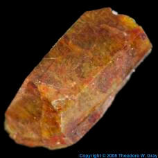 โมนาไซด์